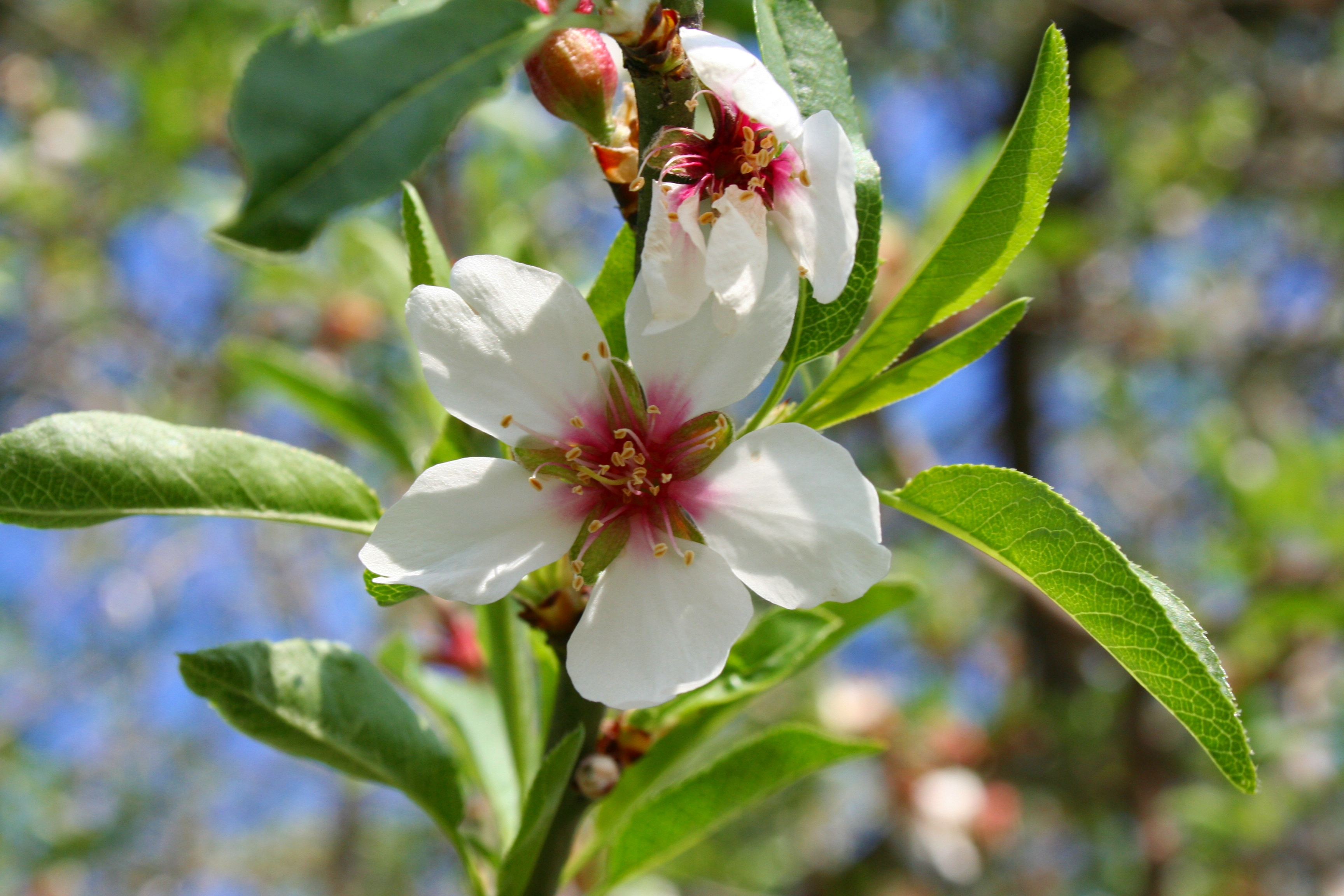 Flor de almendro (Prunus dulcis) fotografiado en el Parque Regional del Sureste, Madrid (España)